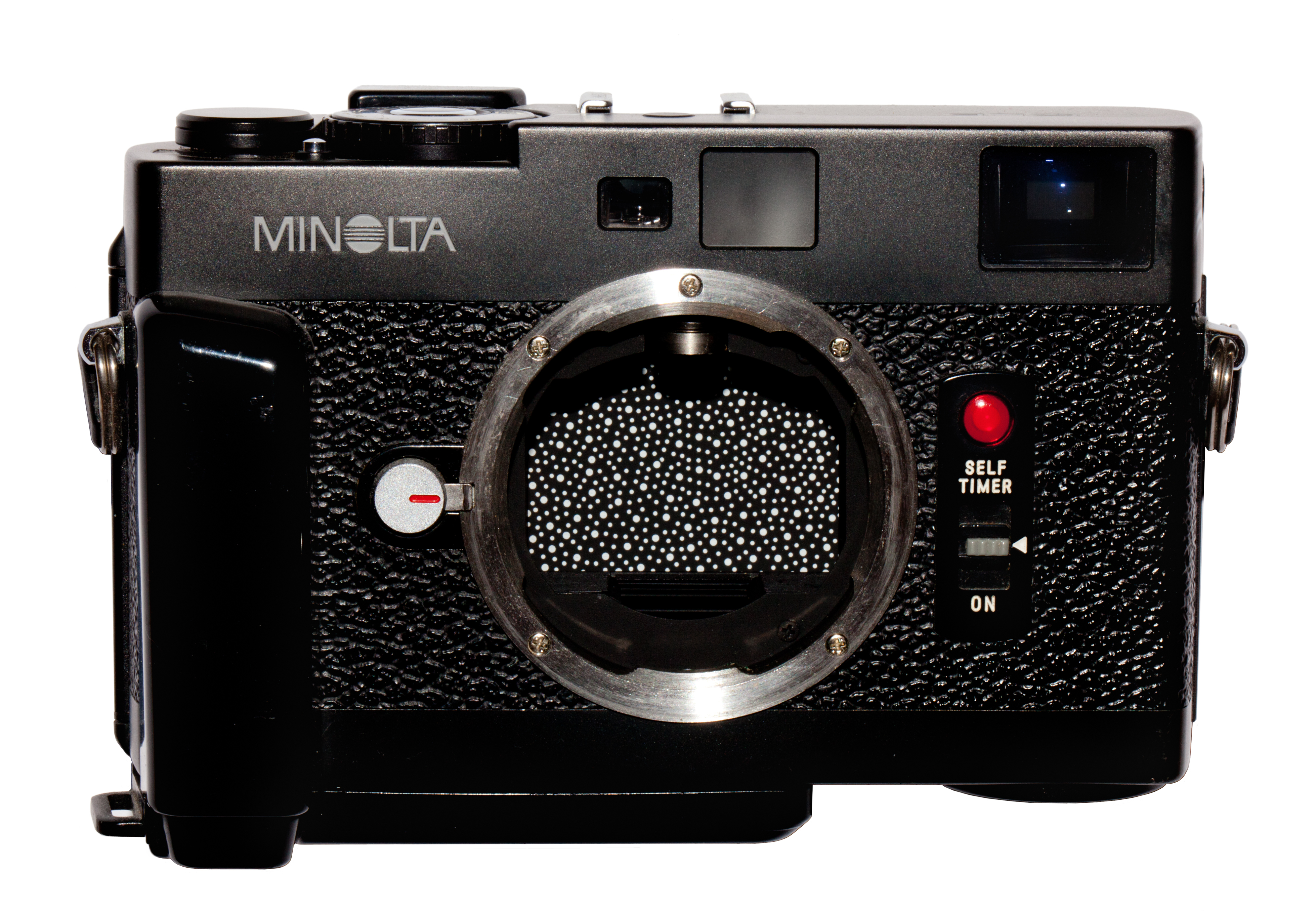 Minolta CLE mit Griff